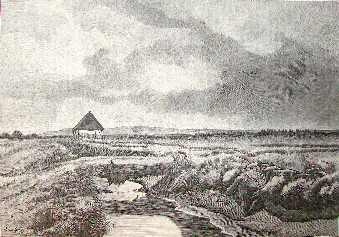 Hedemose